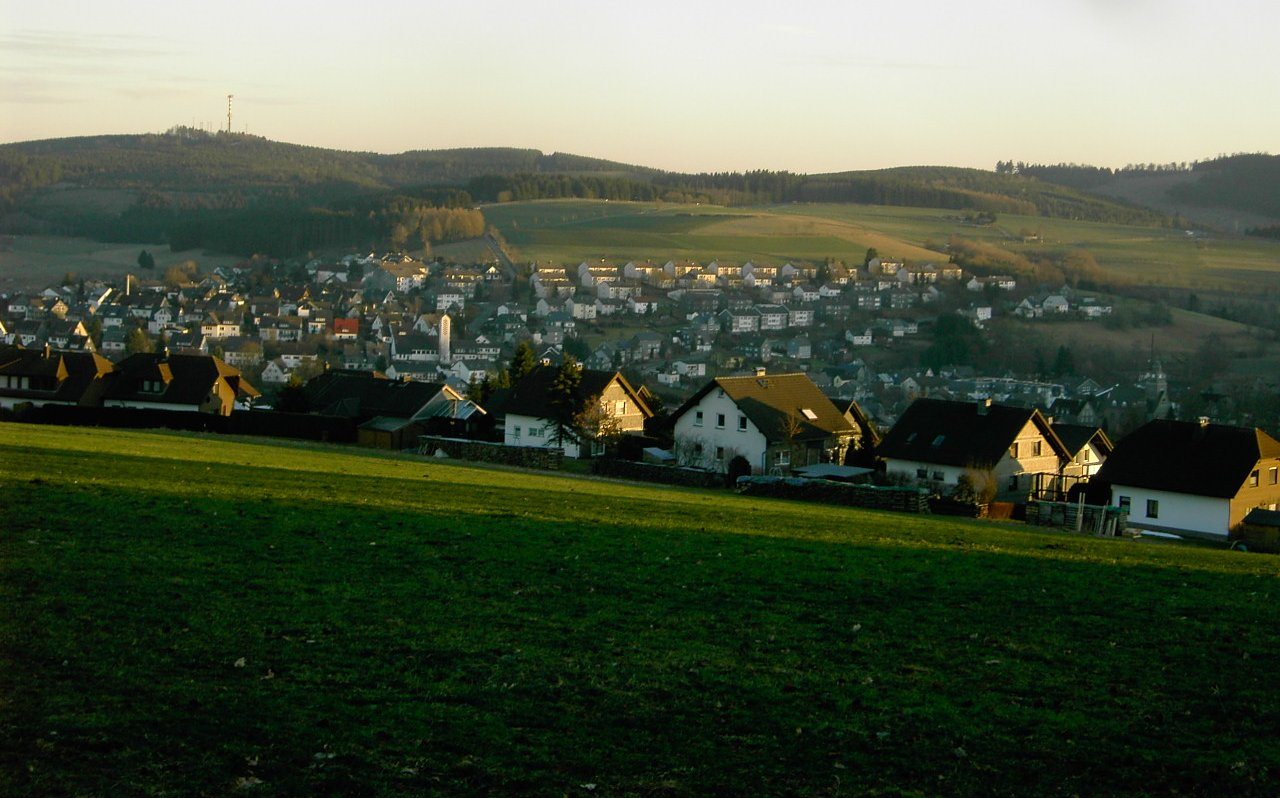 Erndtebrück mit katholischer Kirche vom Hachenberg aus gesehen